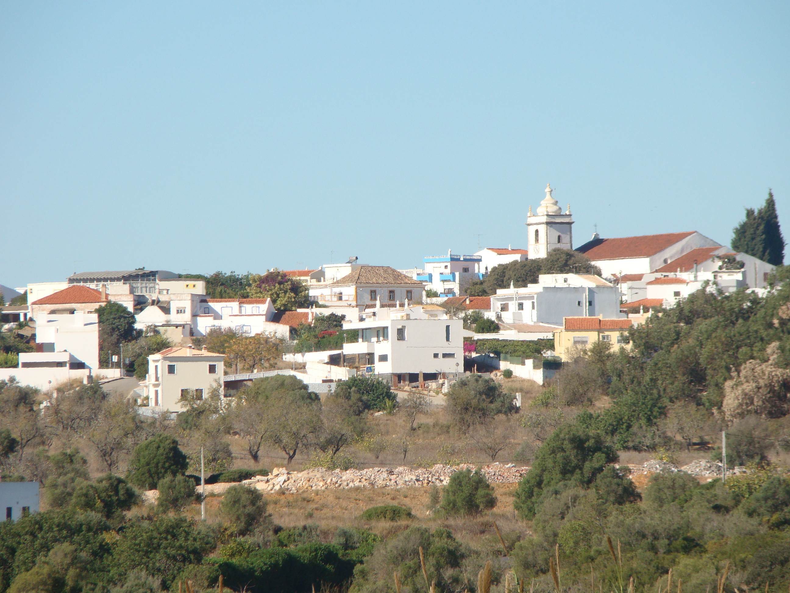 Mexilhoeira Grande 2017